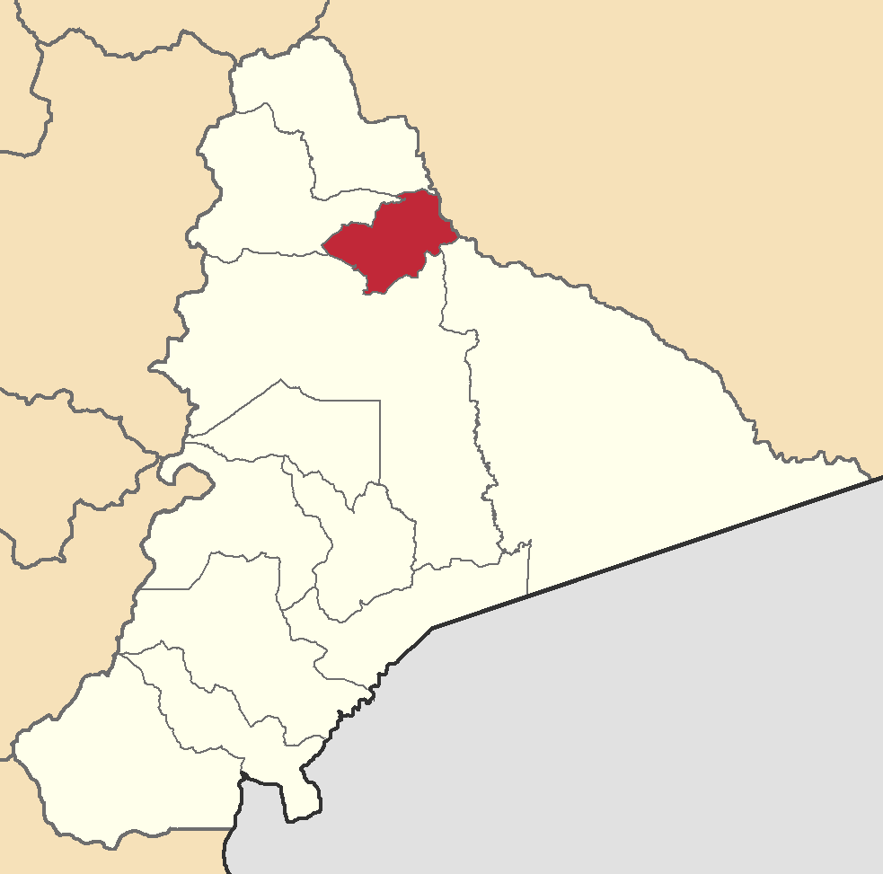 Mapa localizador del cantón en Morona-Santiago, Ecuador